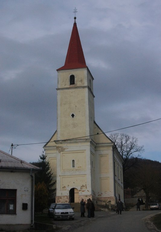 Pernek, Holy Spirit church (1672)